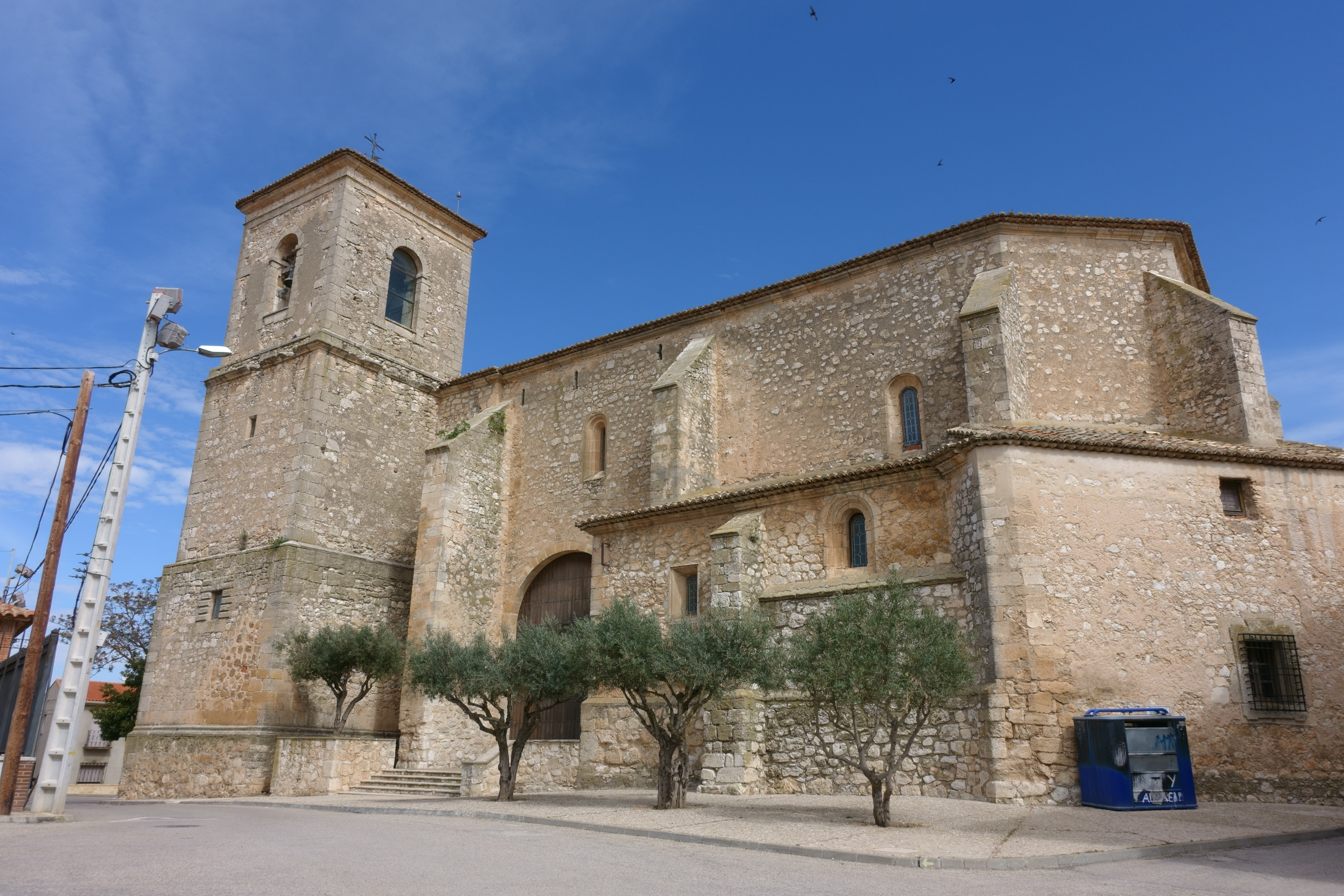 Iglesia de la Asunción de Nuestra Señora, en La Alberca de Záncara (Cuenca, España).